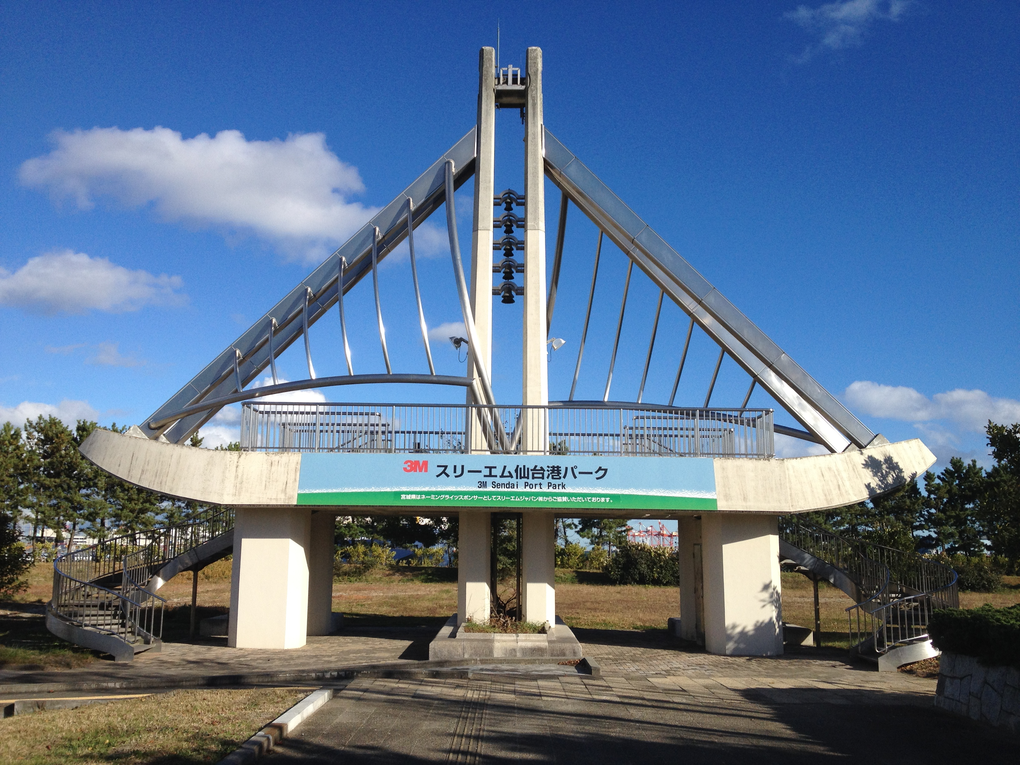 仙台港中央公園に立地する船の形をかたどったオブジェ